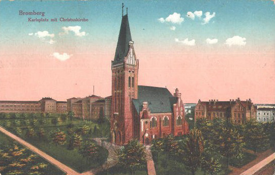 Kościół Chrystusa Zbawiciela w Bydgoszczy